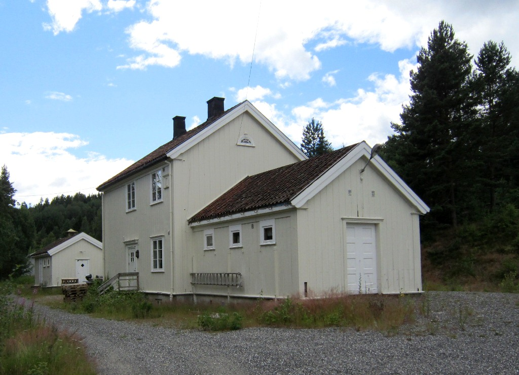 Farsjø stasjon